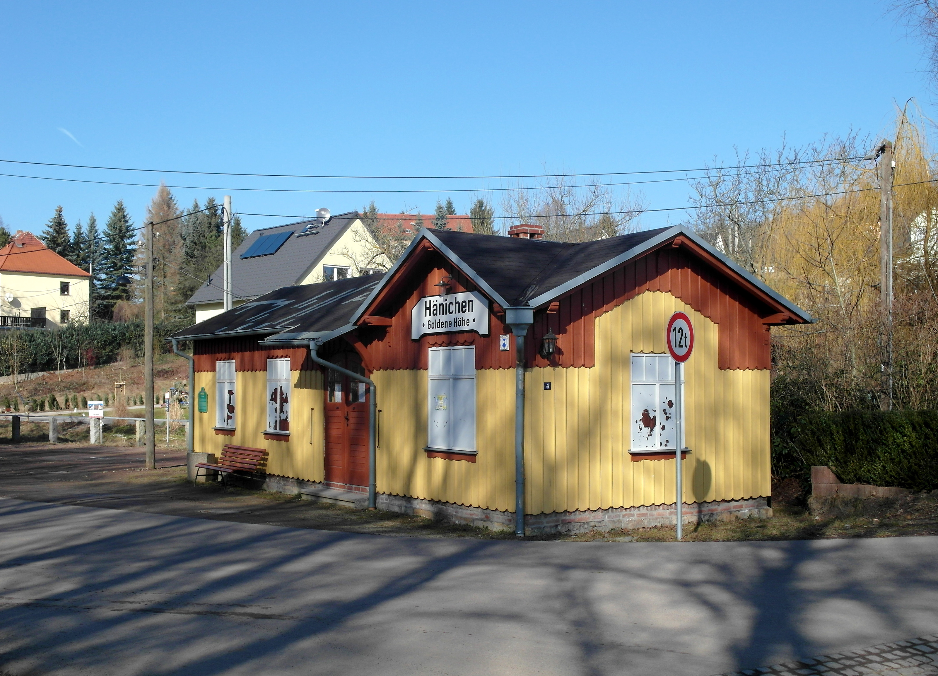 19.02.2015 01728 Hänichen (Bannewitz): Windbergbahn. Haltepunkt Hänichen - Goldene Höhe, Bahnhofsgebäude (GMP: 50.980614,13.715803). Bahnhofstraße. [SAM8214.JPG]20150219025DR.JPG(c)Blobelt